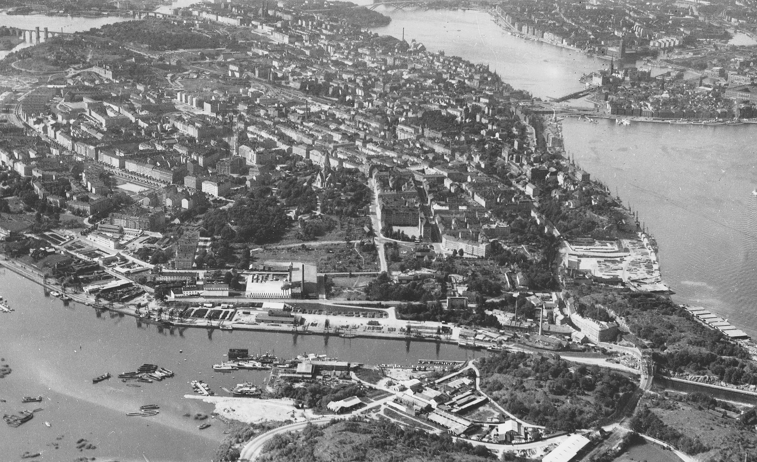 Flygfoto över Södermalm från nordost